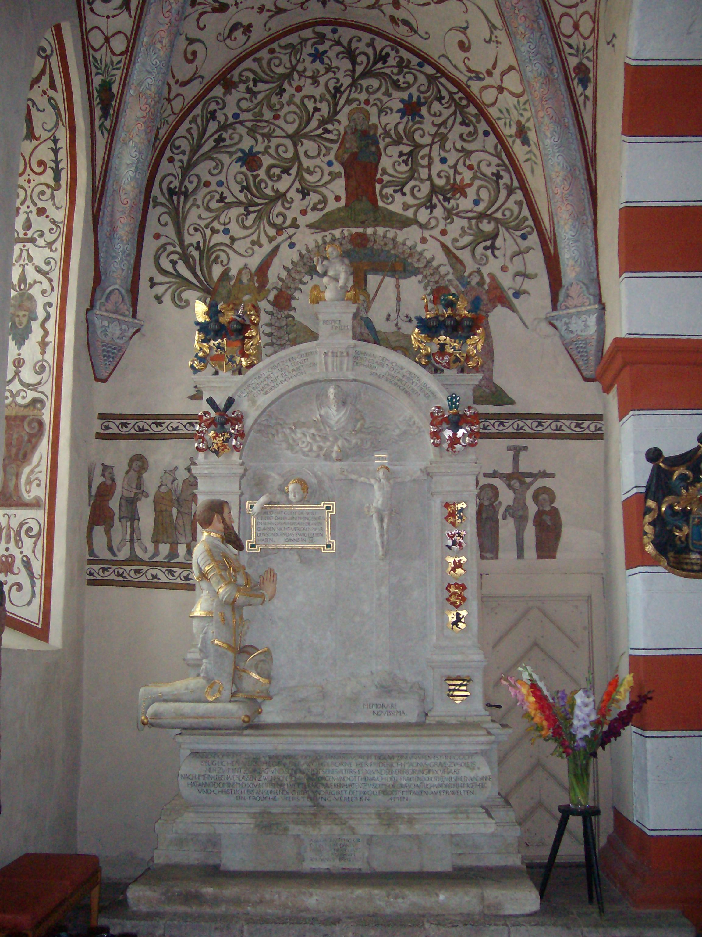 Grabmal von Friedrich Magnus in der ev. Stadtkirche in Laubach, Hessen